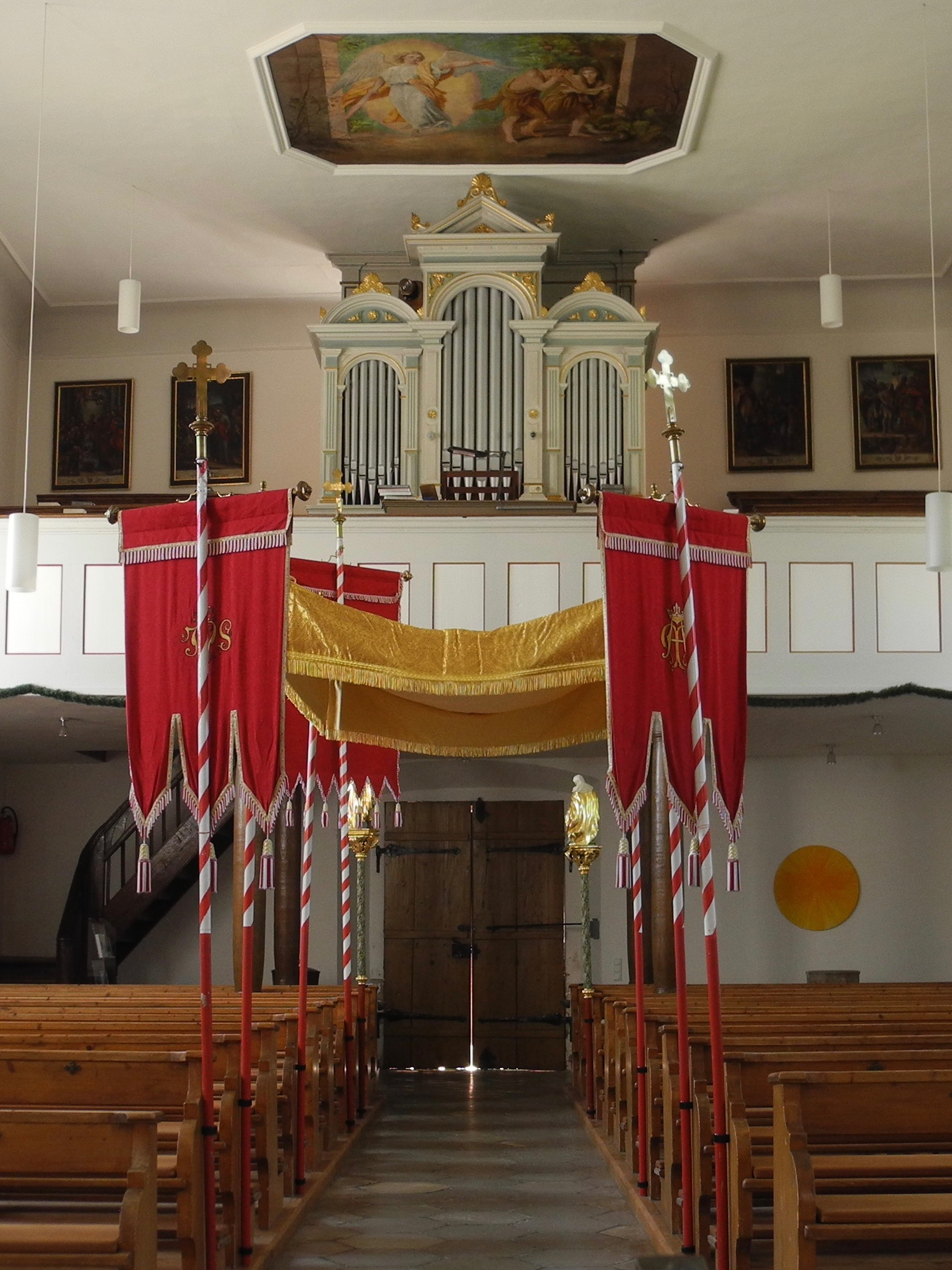 1. MANUAL: Bourdon 16', Principal 8', Gamba 8', Gedackt 8', Octav 4', Mixtur 2 2/3' 2. MANUAL: Geigenprincipal 8', Lieblich Gedeckt 8', Salicional 8', Flöte octaviante 4' PEDAL: Subbaß 16', Violonbaß 8' KOPPELN UND SPIELHILFEN: II-I, II-P, I-P, Suboktavkoppel, Tutti BEMERKUNGEN: Kegellade, pneumatische Spiel- und Registertraktur